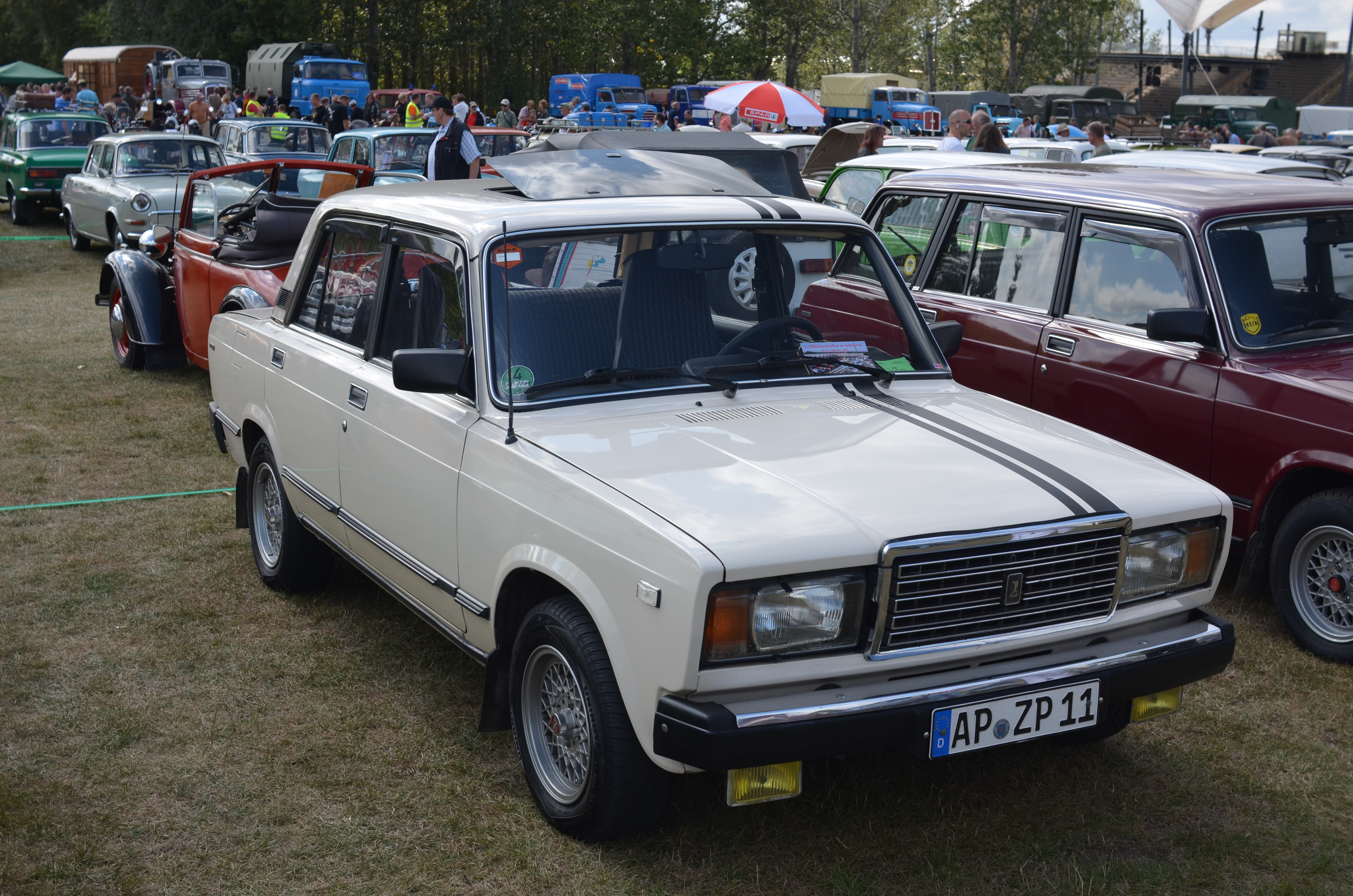 Lada